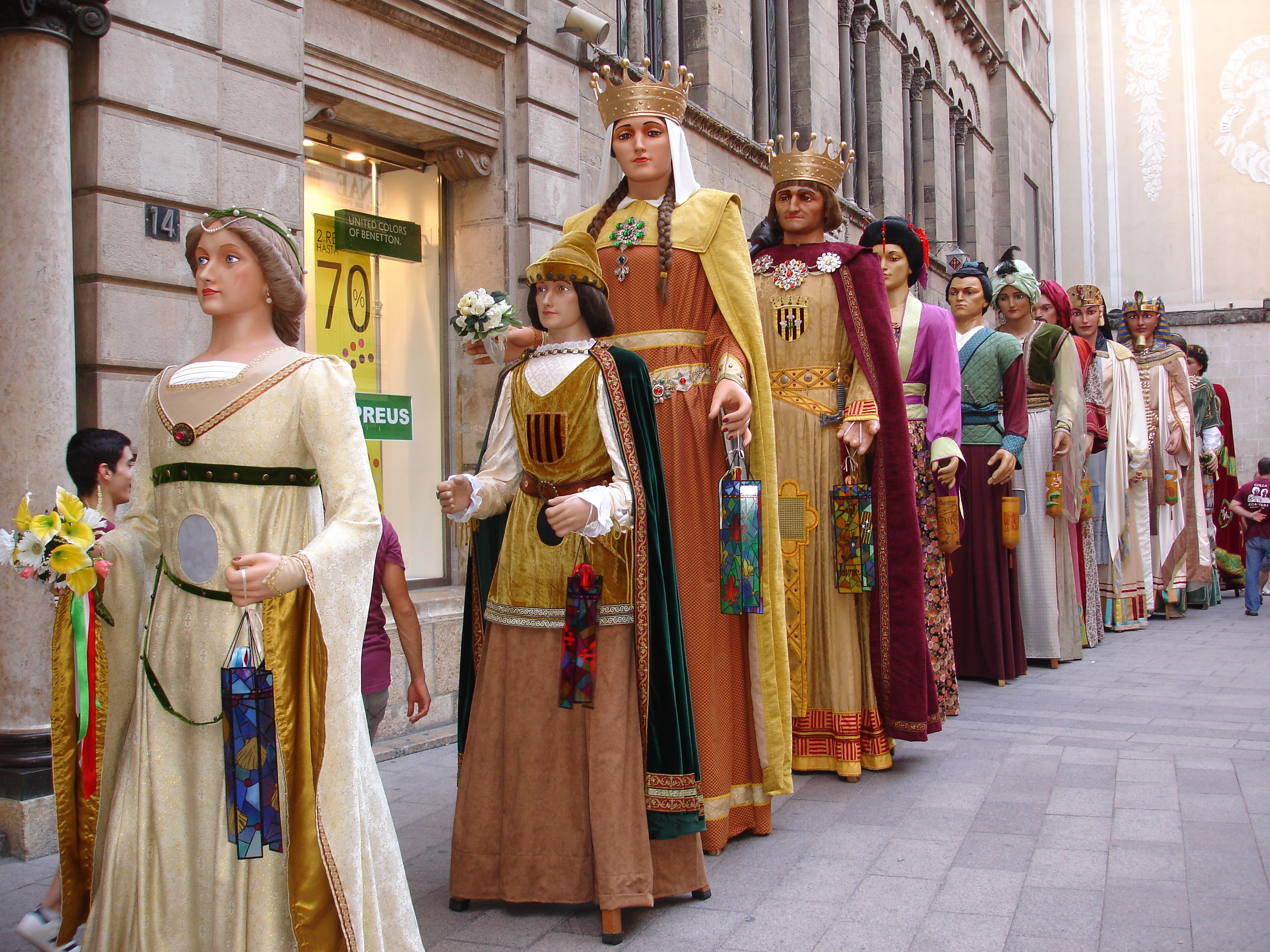 Les Géants de Lleida, Catalogne